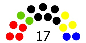 Elections européennes de 2009 en Autriche